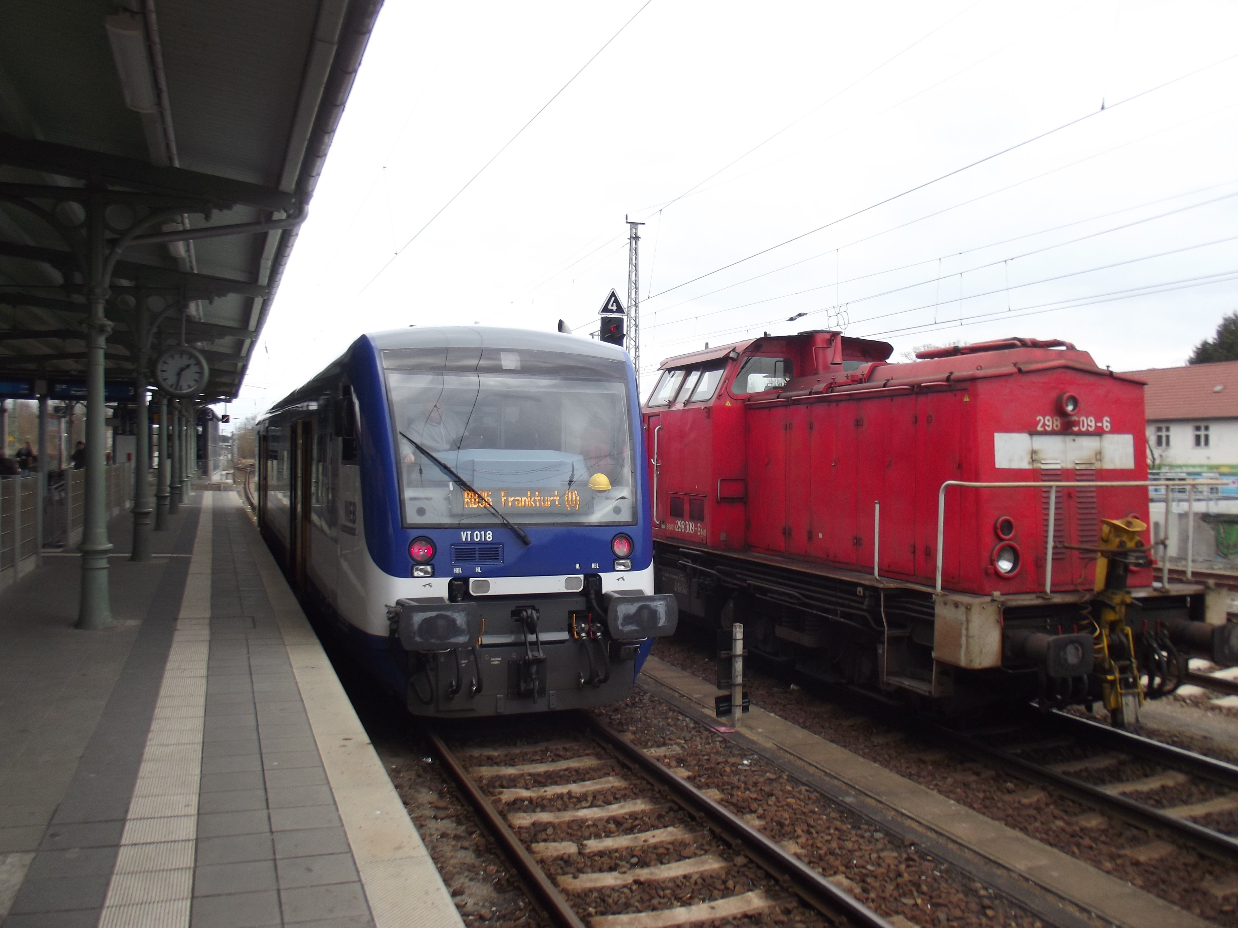 Lokale RB 36 trein in station Könings Wusterhausen